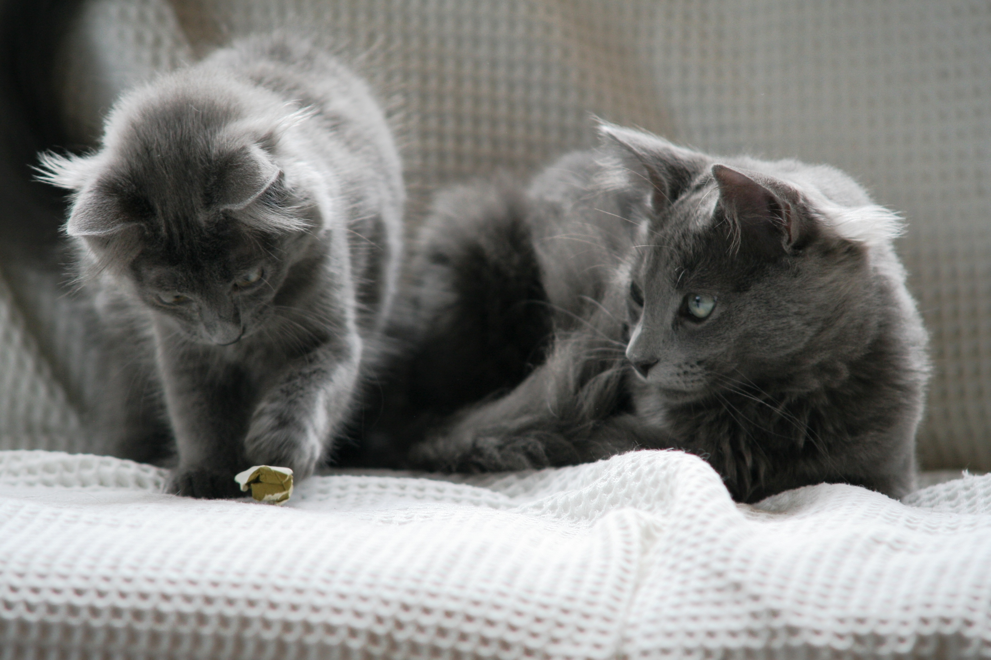 Ozar_en_Palaya Azadeh/ Nebelung.JPG